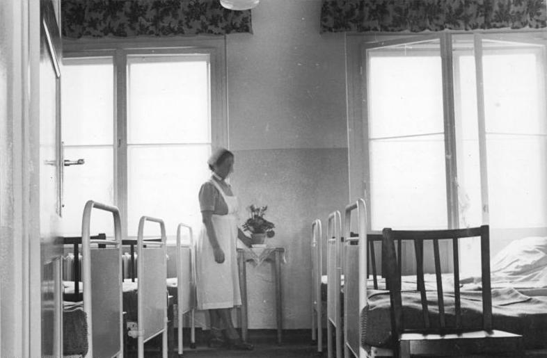 Berlin-Köpenick, Städtisches Krankenhaus Illus Richter 26.11.50 30.11.50 - Zwei Jahre demokratischer Magistrat von Gross-Berlin. Zum 2. Jahrestag des demokratischen Magistrats von Gross-Berlin wurden verschiedene Bauprojekte vorfristig erstellt. Im Städtischen Krankenhaus Köpenick. UBz: Hier wurden 100 Krankenbetten neu erstellt.